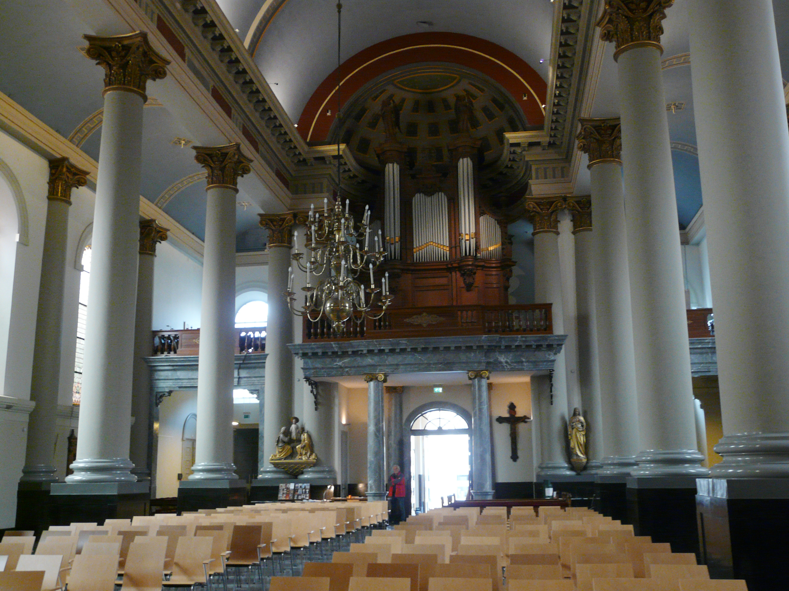 Sint-Antoniuskathedraal in Breda Centrum in Breda